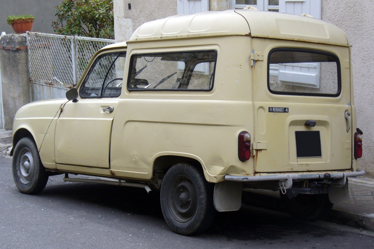 Renault 4 Kastenwagen